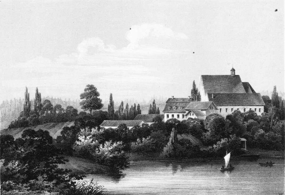 Schlossvorwerk Chemnitz, heute Stadtteil Schloßchemnitz